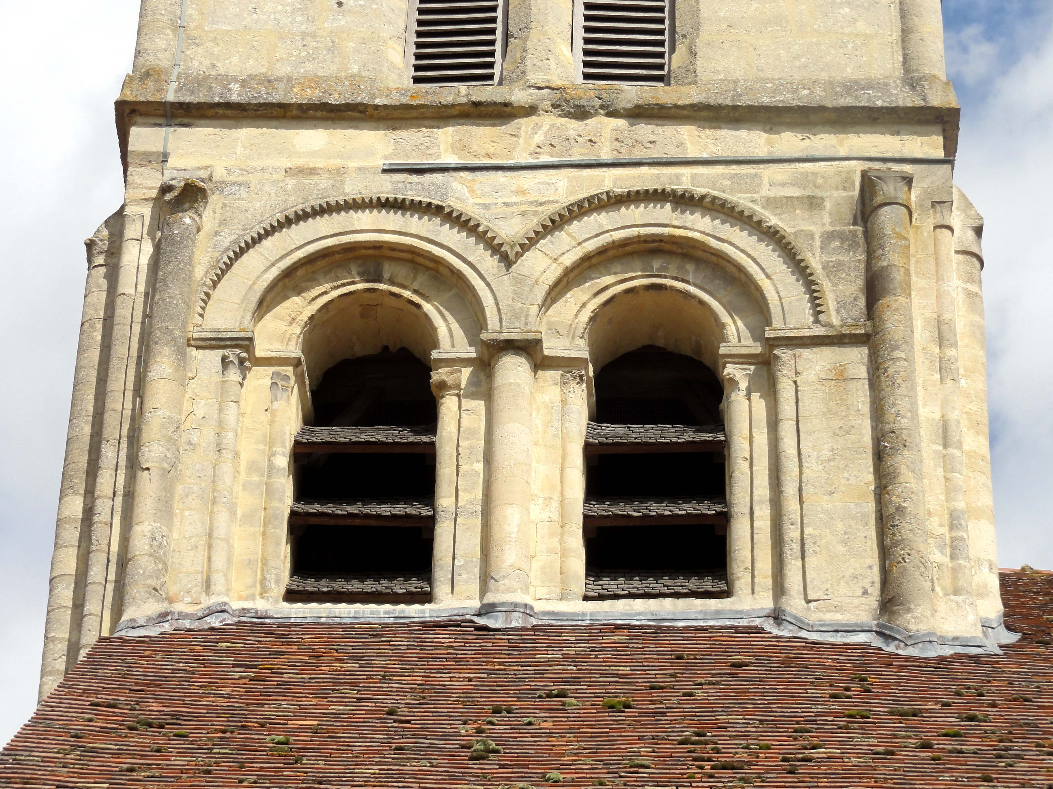 Église Notre-Dame de Théméricourt (voir titre).